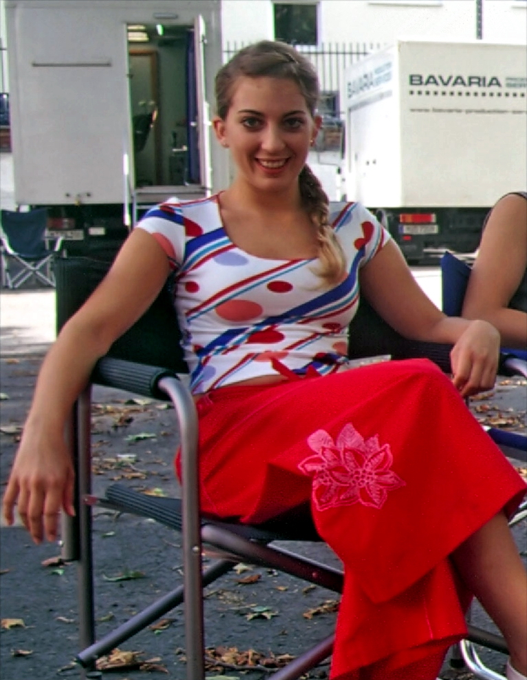 Nora Binder bei den Dreharbeiten zur vierten Staffel von „Mein Leben und ich“